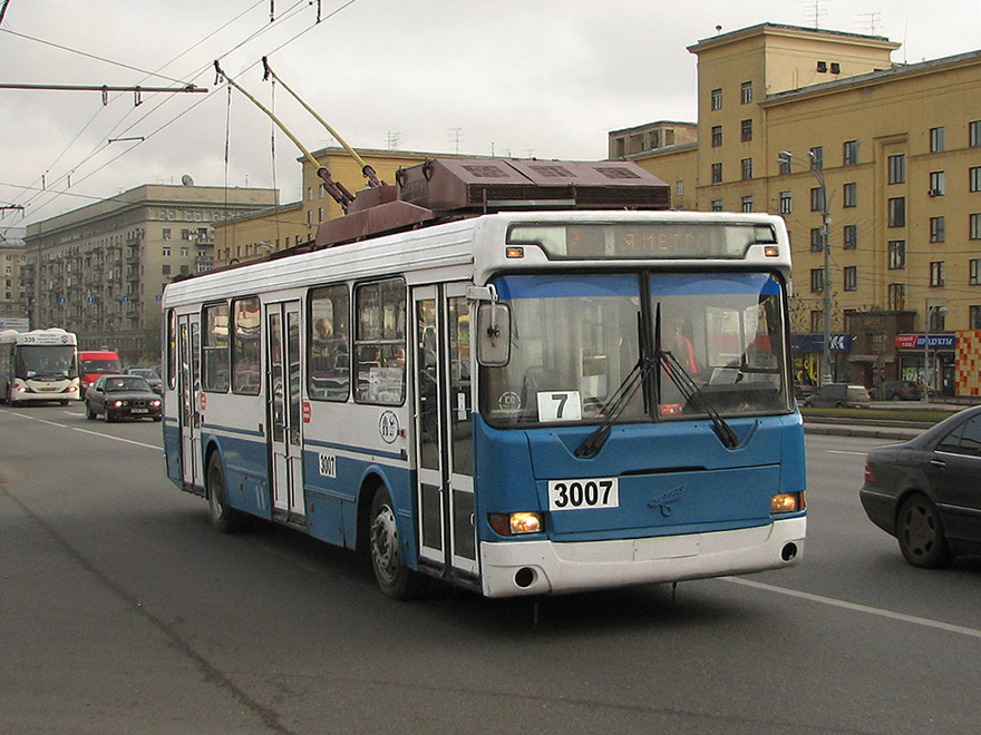 Троллейбус МТРЗ-5279.1 № 3007 на Кутузовском проспекте в Москве.